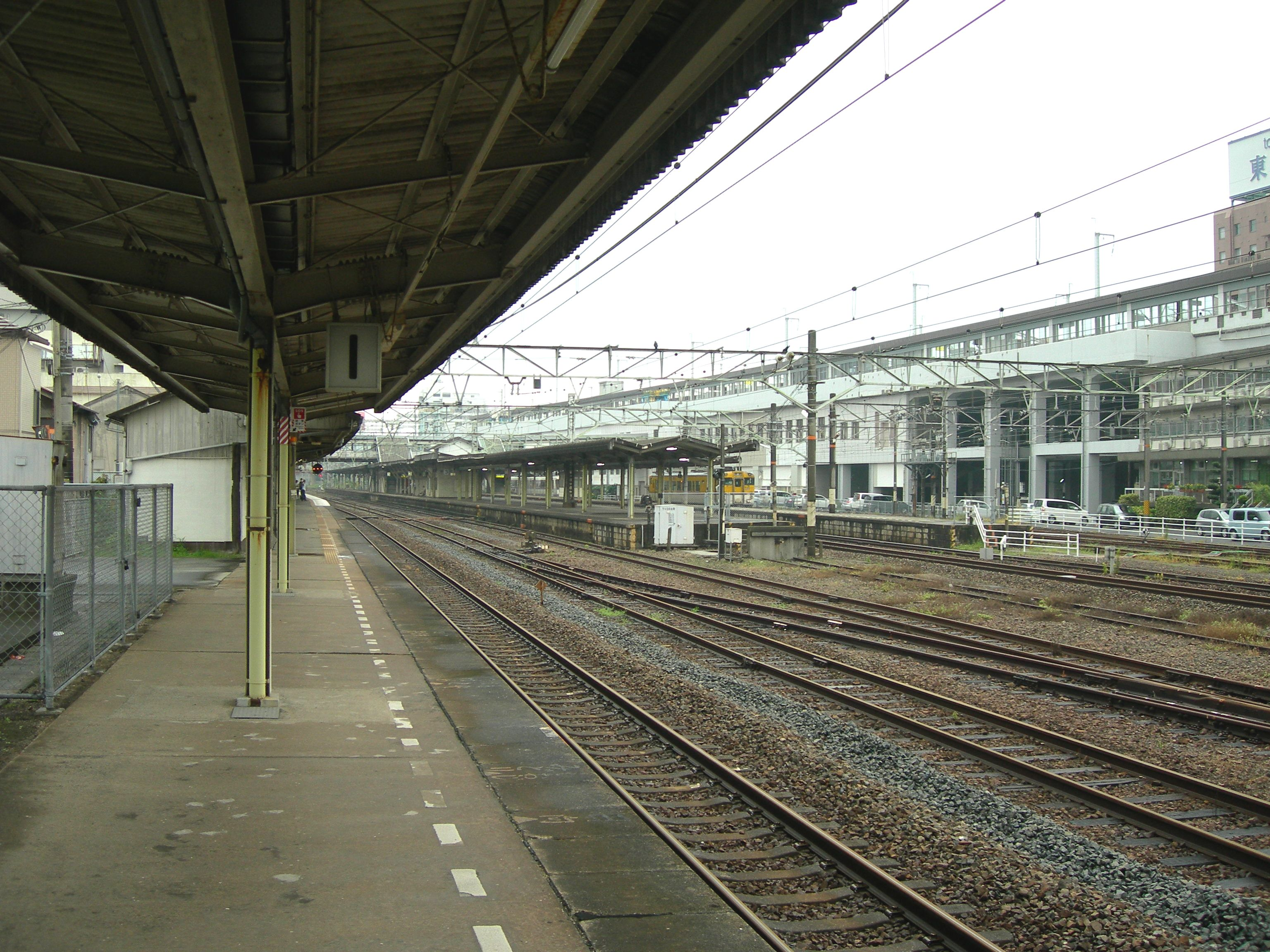 徳山駅在来線ホーム